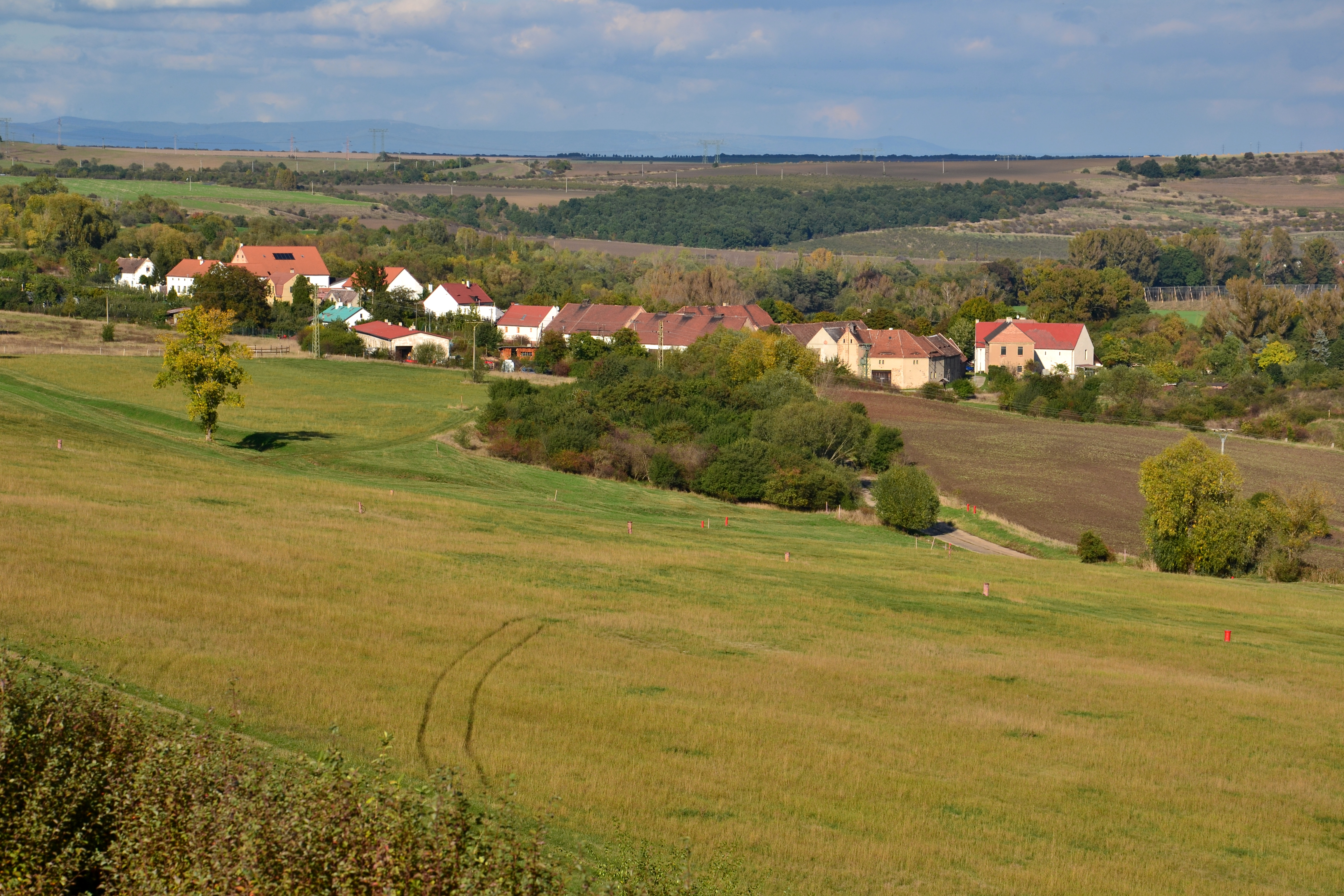 Nechranice – celkový pohled z přehradní hráze